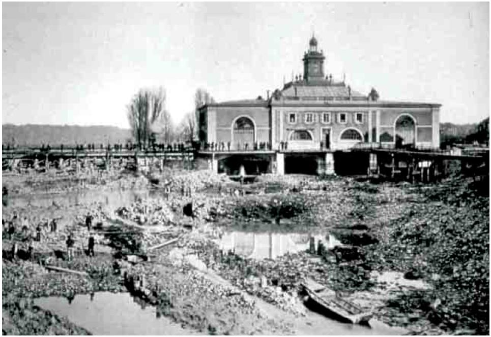 Genève, travaux sur le bras droit du Rhône en 1887.